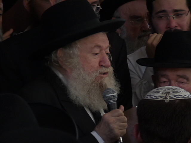 ישיבת מרכז הרב.